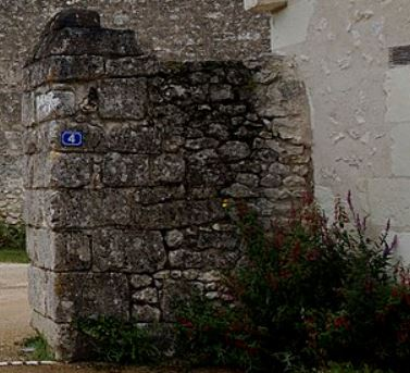 Pilier droit du portail d'accès au prieuré du Louroux